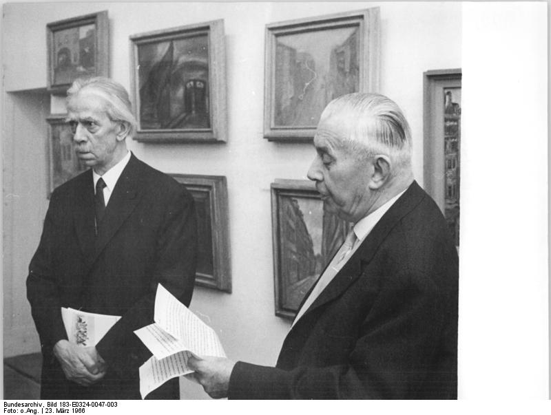 Berlin, Otto Nagel-Ausstellung, Ihering Zentralbild ZB Knh.- 24.3.1966 Der Theaterkritiker Herbert Ihering würdigte am 23. März 1966 in der Westberliner Ladengalerie das künstlerische Werk des Vizepräsidenten der Deutschen Akademie der Künste, Prof. Otto Nagel (links im Bild). Vor rund 100 Teilnehmern sprach H. Ihering anläßlich der zweiten Ausstellung des DDR-Künstlers, der seiner Sammlung den Titel "Berliner Bilder" gab. Abgebildete Personen: Nagel, Otto Prof.: Maler, Präsident der Akademie der Künste (AdK), Nationalpreisträger, Vaterländischer Verdienstorden (VVO) in Gold, DDR (GND 118586300) Ihering, Herbert: Theaterkritiker, DDR (GND 118708627)